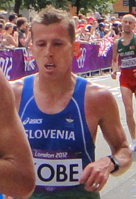 Primož Kobe (Slovenia) - London 2012 Men's Marathon